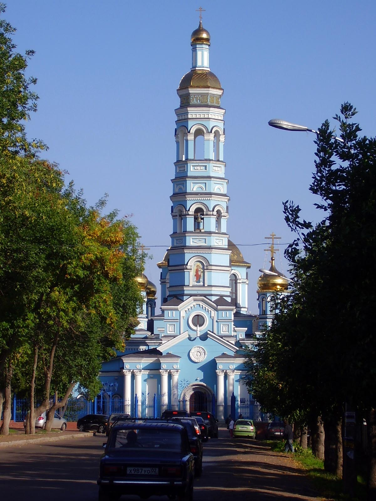 Храм Рождества Пресвятой Богородицы (Уфа). Дата постройки: Между 1903 и 1909. Адрес: 450014, Респ. Башкортостан, г. Уфа, ул. Кирова, 101.